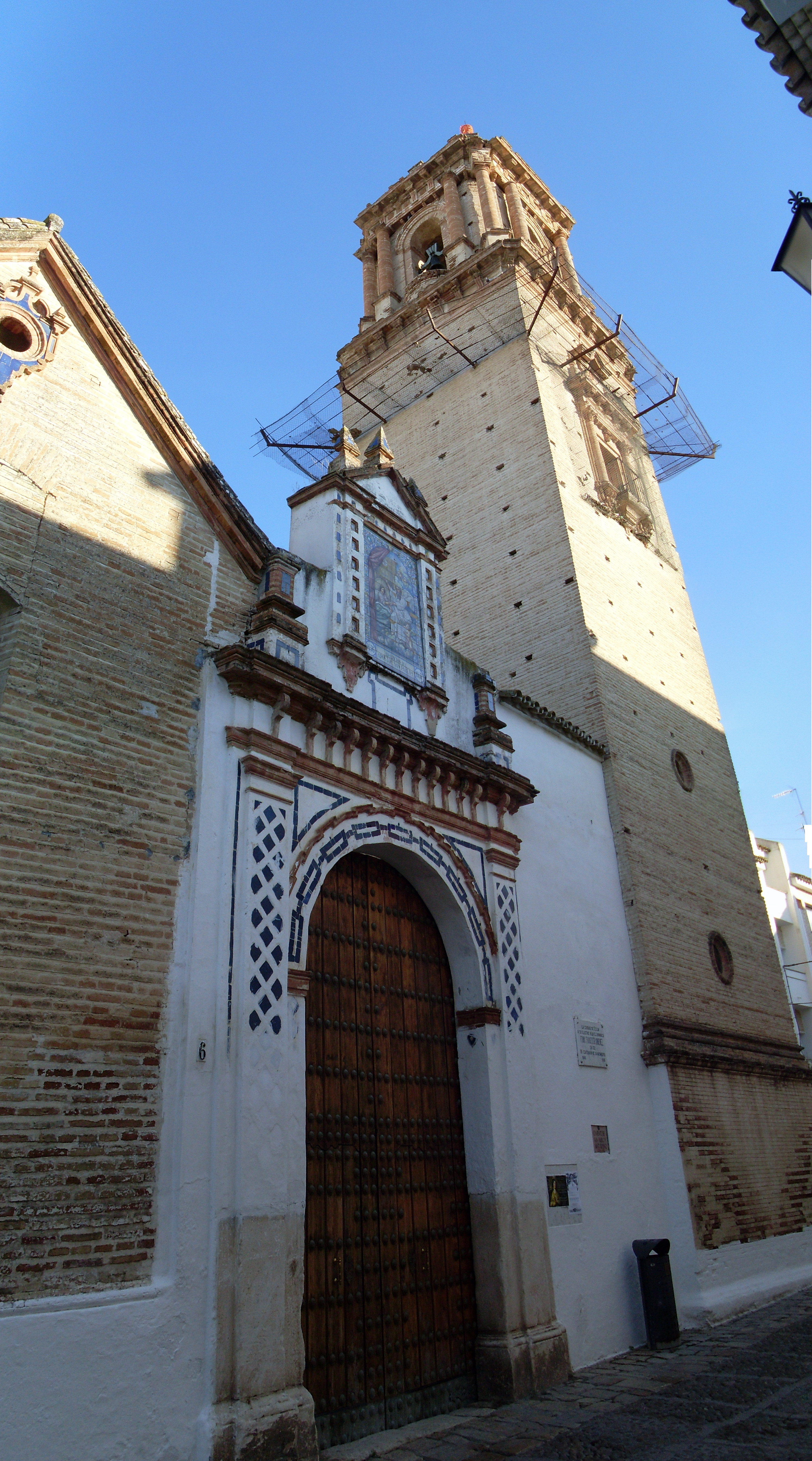 Convento de San Pablo y Santo Domingo de la ciudad de Écija, está situado cerca de la Parroquia de Santa cruz de Écija.